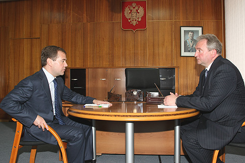 СМОЛЕНСКАЯ ОБЛАСТЬ, ГАГАРИН. С губернатором Смоленской области Сергеем Антуфьевым.